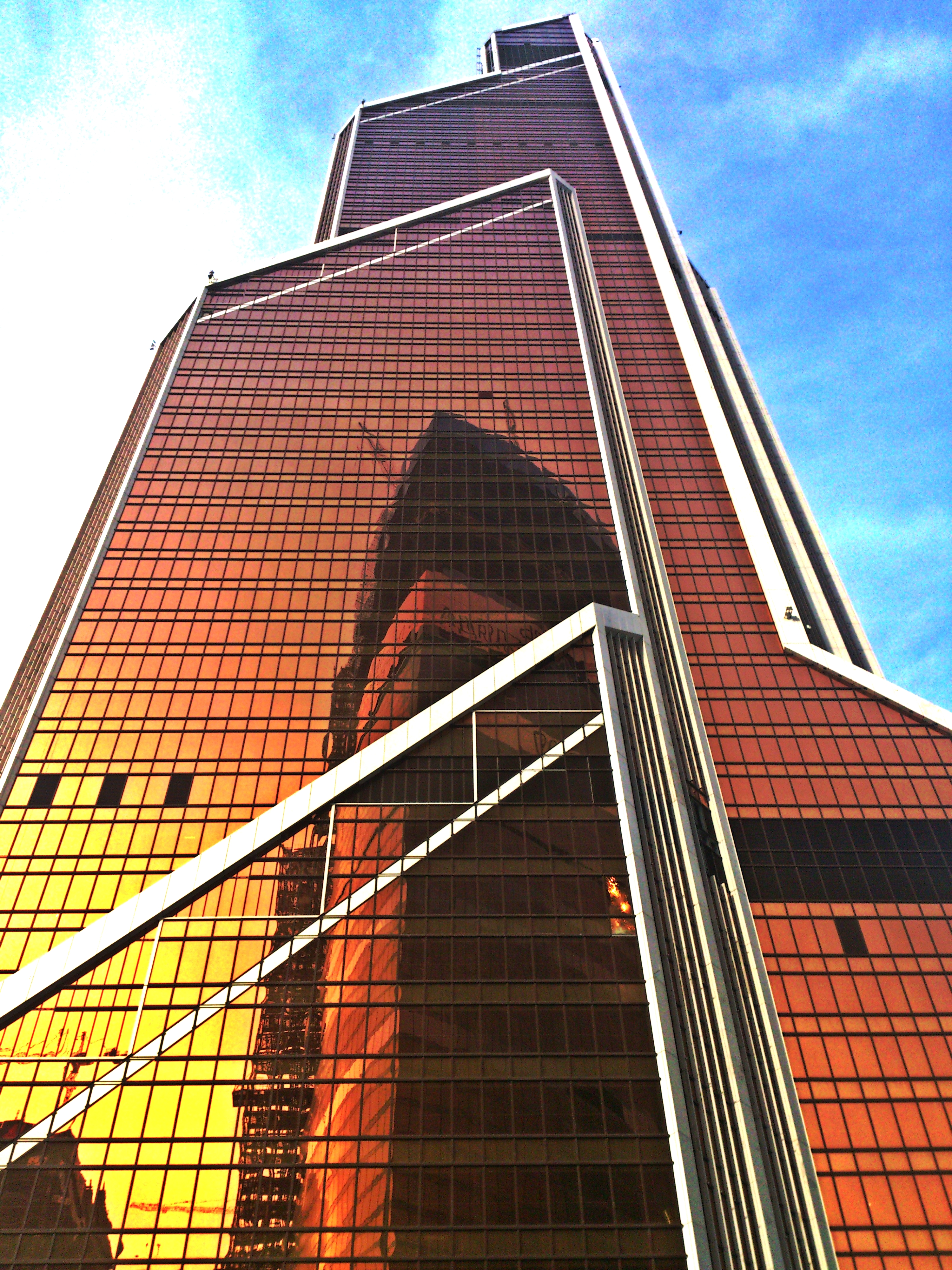 Меркурий Сити Тауэр